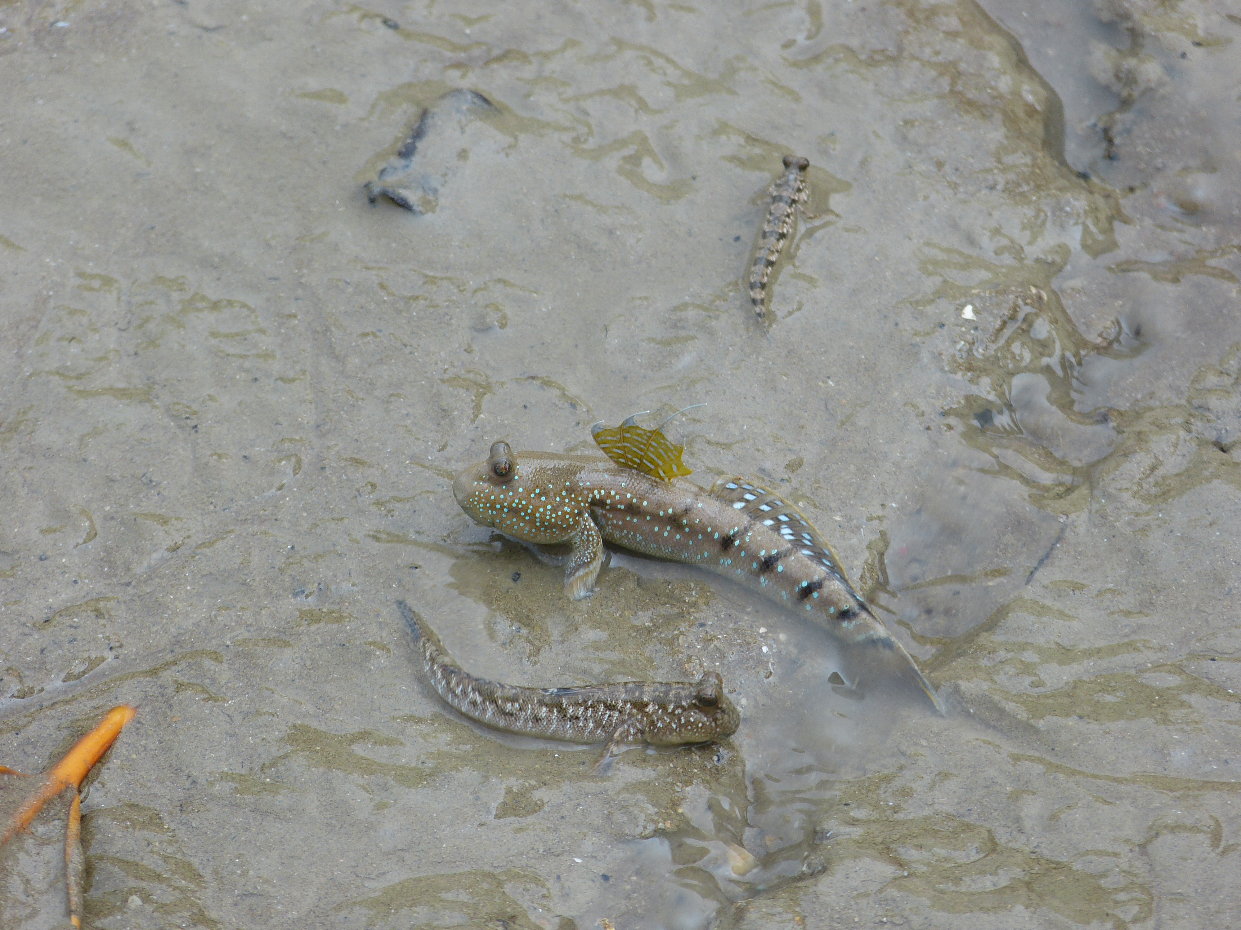 Bako NP, Sarawak, MALAYSIA